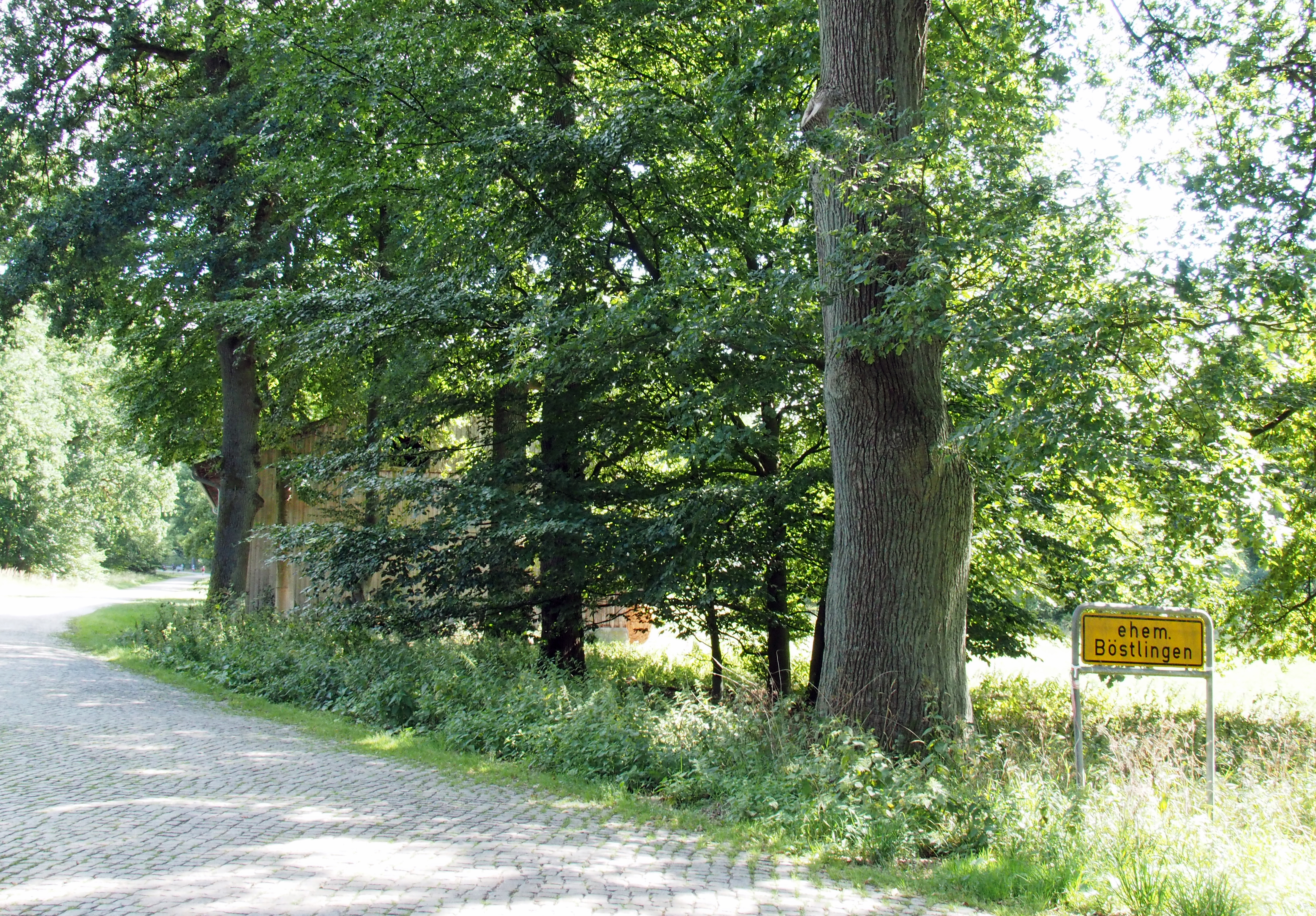 ehemaliges Dorf Böstlingen (Heidmark)